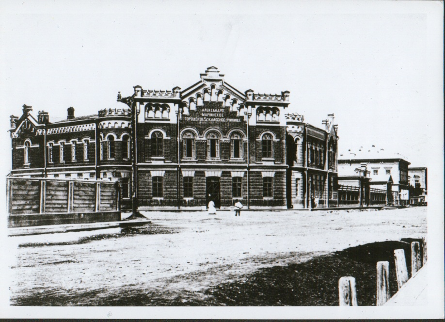 г. Иркутск. Городское 5-ти классное училище, 1894-1895г. арх.В. А. Рассушин.